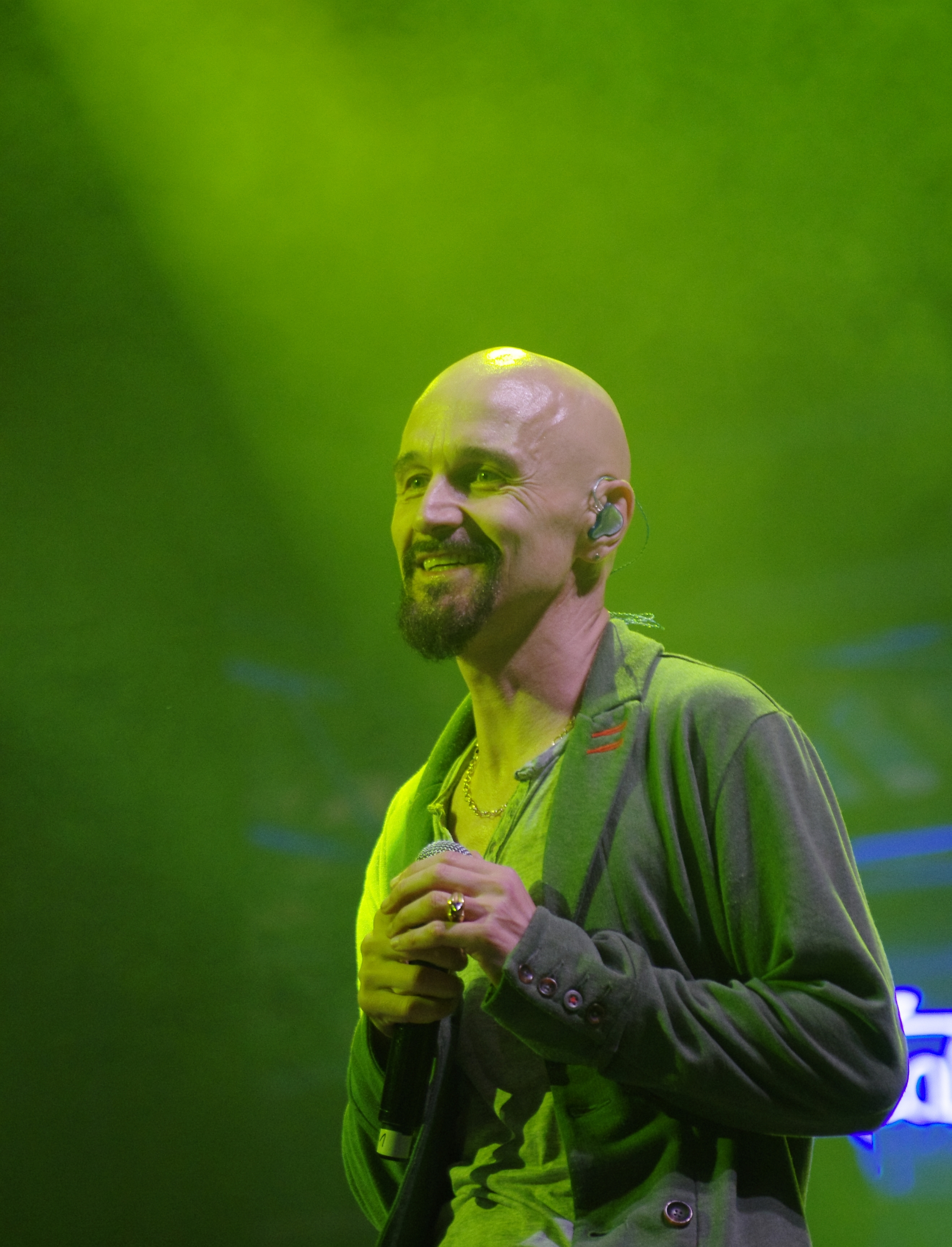 James (band) auf dem Haldern Pop Festival 2013. Hauptbühne. Besetzung: Tim Booth (Gesang) Jim Glennie (Bass) Larry Gott (Gitarre) Saul Davies (Gitarre, Violine, Percussion) Mark Hunter (Keyboards) Dave Baynton-Power (Schlagzeug) Andy Diagram (Trompete, Percussion)